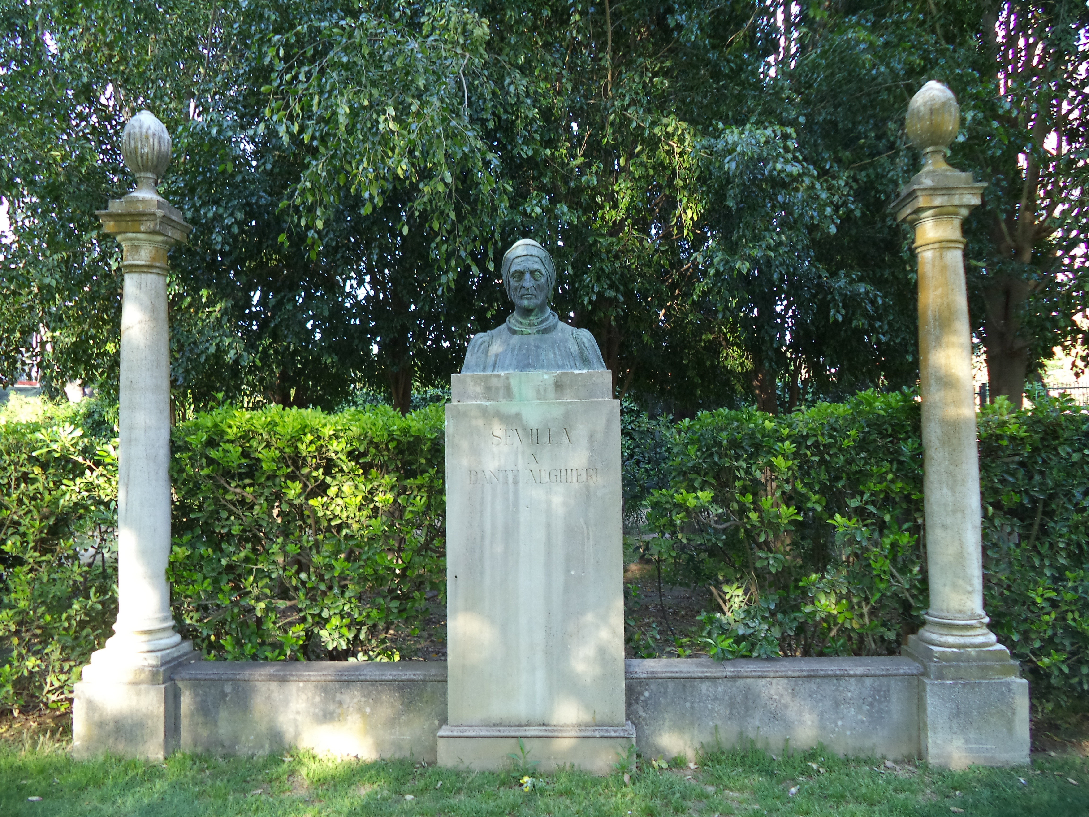 Glorieta de Danto Alighieri en el parque de María Luisa de Sevilla